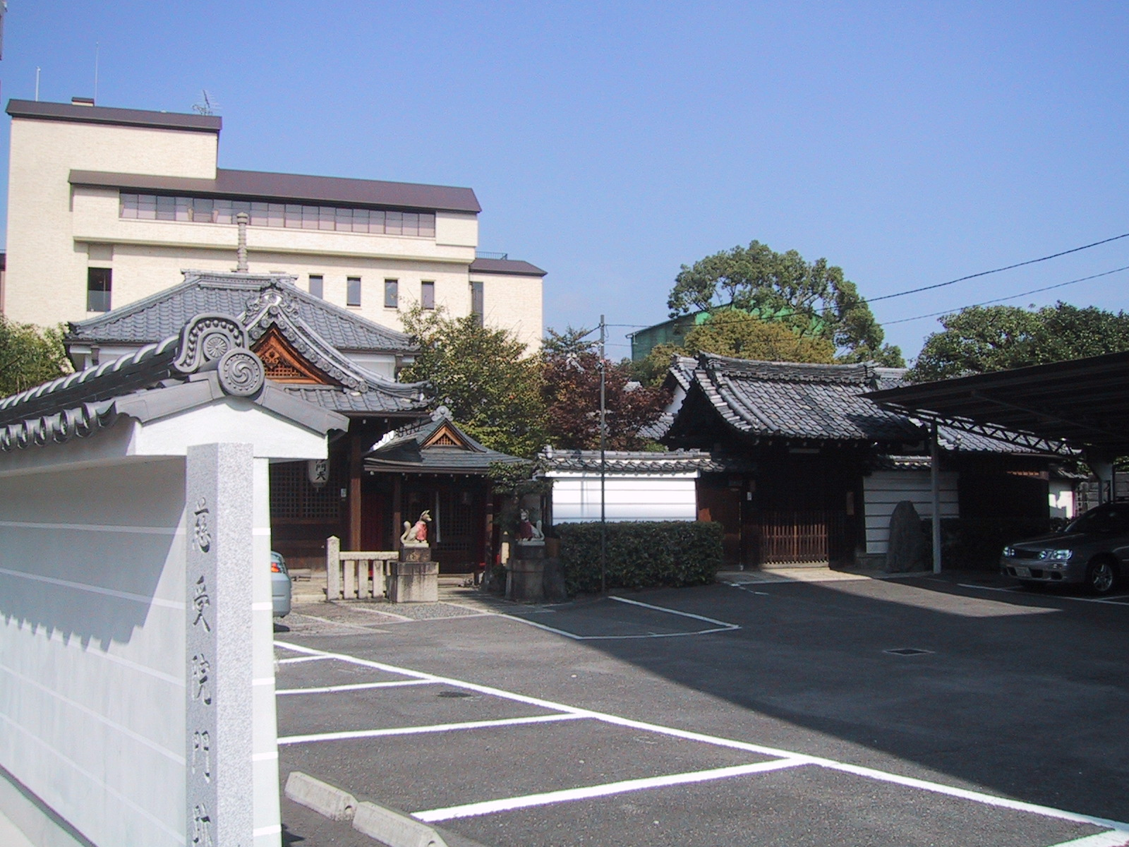 慈受院門跡